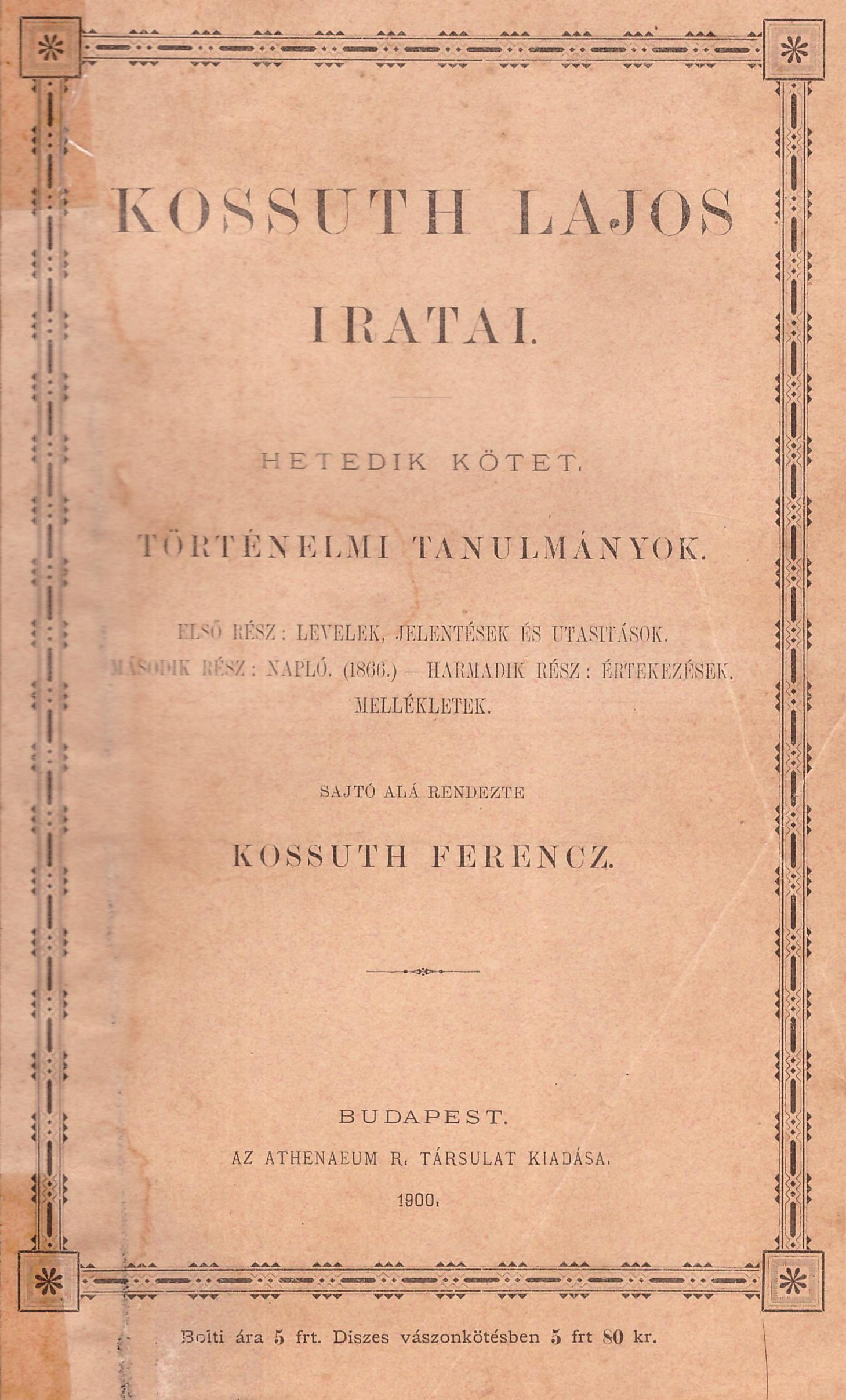 Kossuth Lajos iratai, VII. kötet